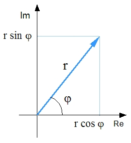 komplex vektor